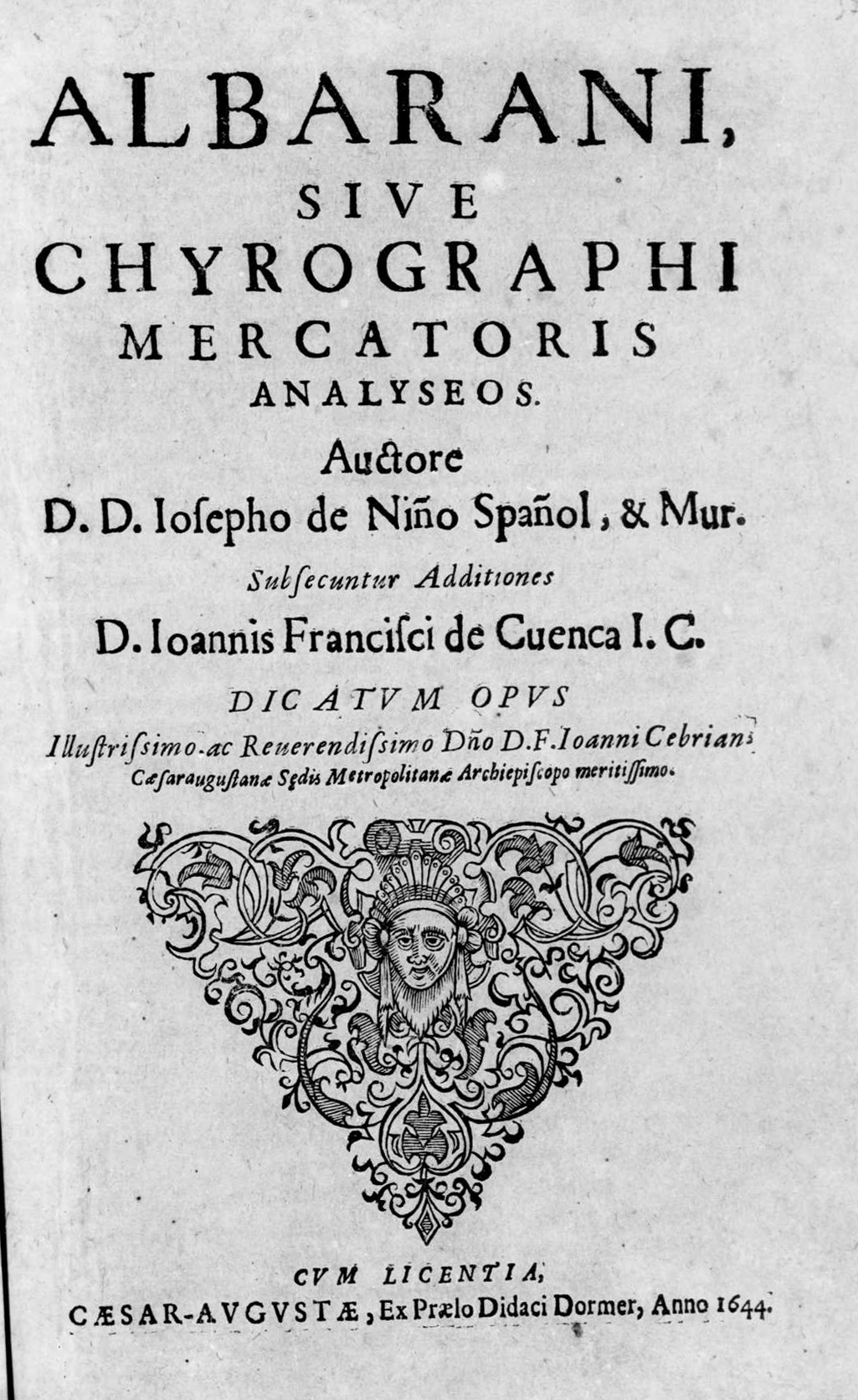 Frontespizio